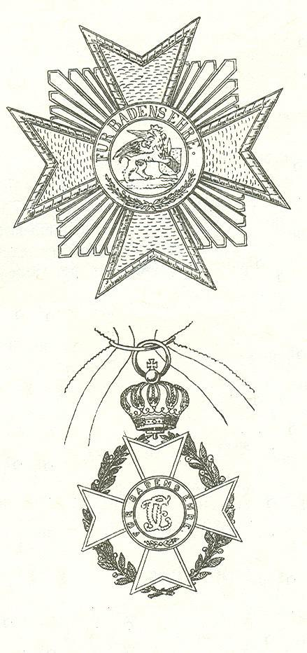 Eigen bewerking van een afbeelding uit 1893